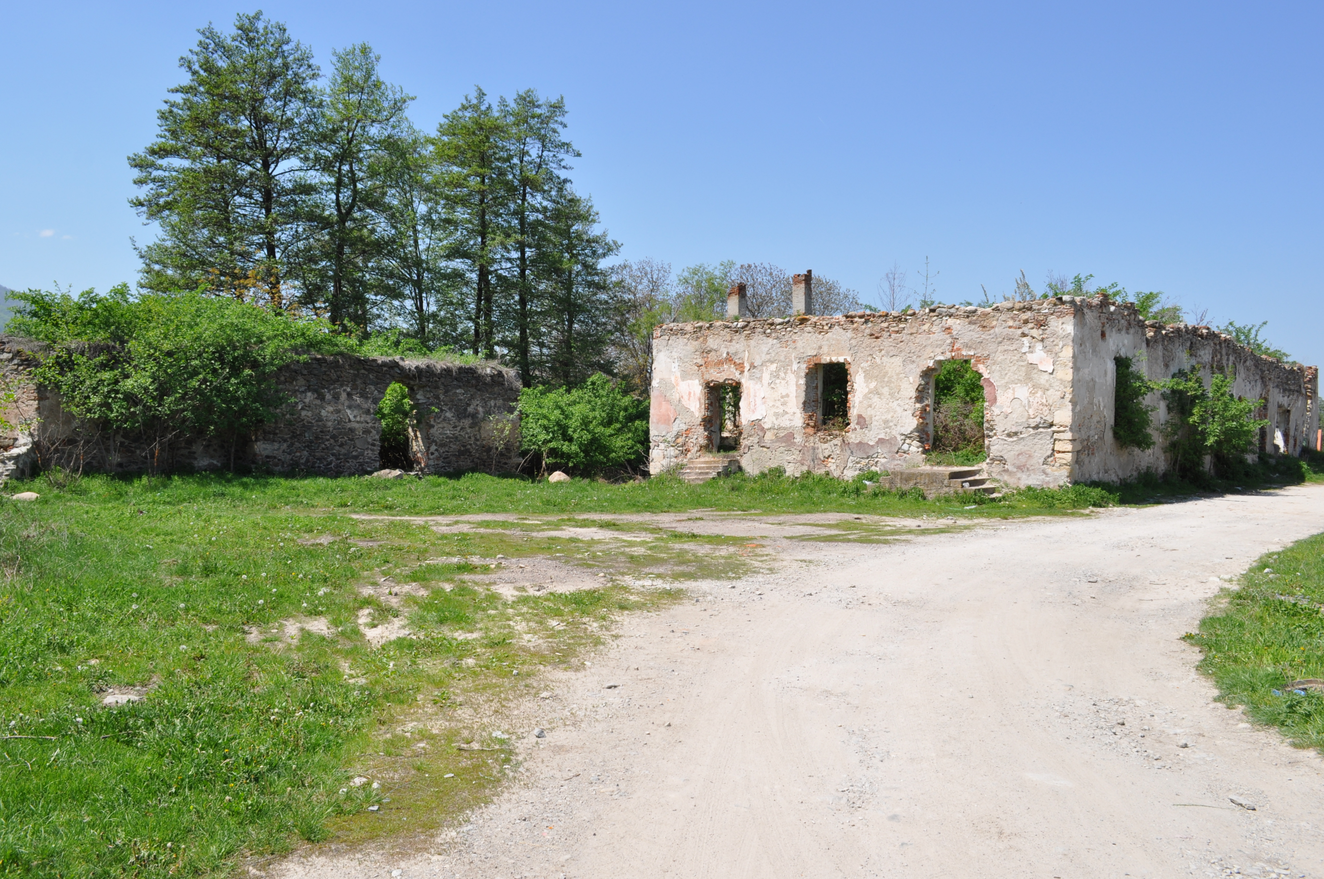 Curtea nobiliară a Cândeştilor, sat RÂU DE MORI; comuna RÂU DE MORI 01